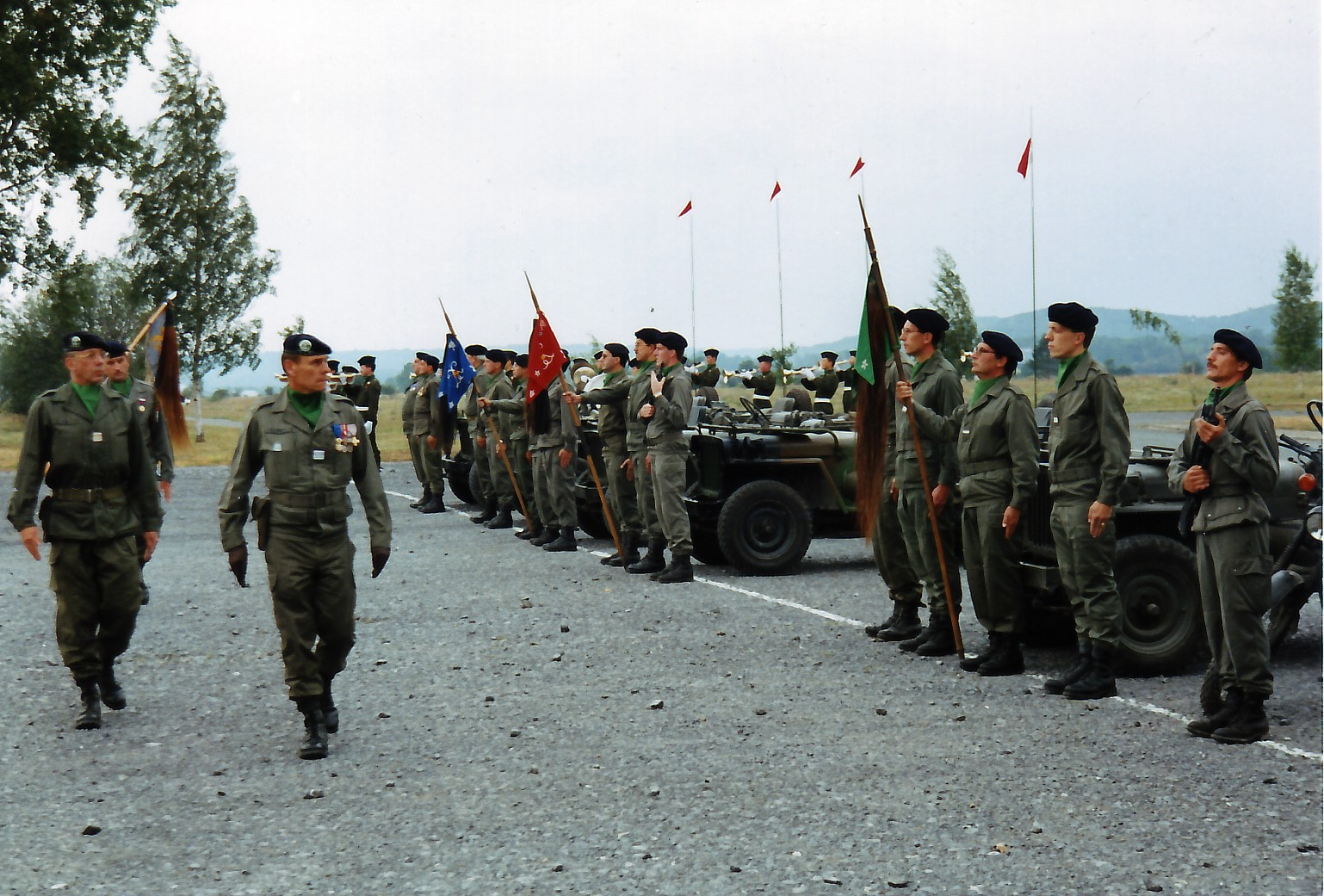 les escadrons du 5e Hussards (réserve) à Couvron, septembre 1991, colonel Brunet d'Evry